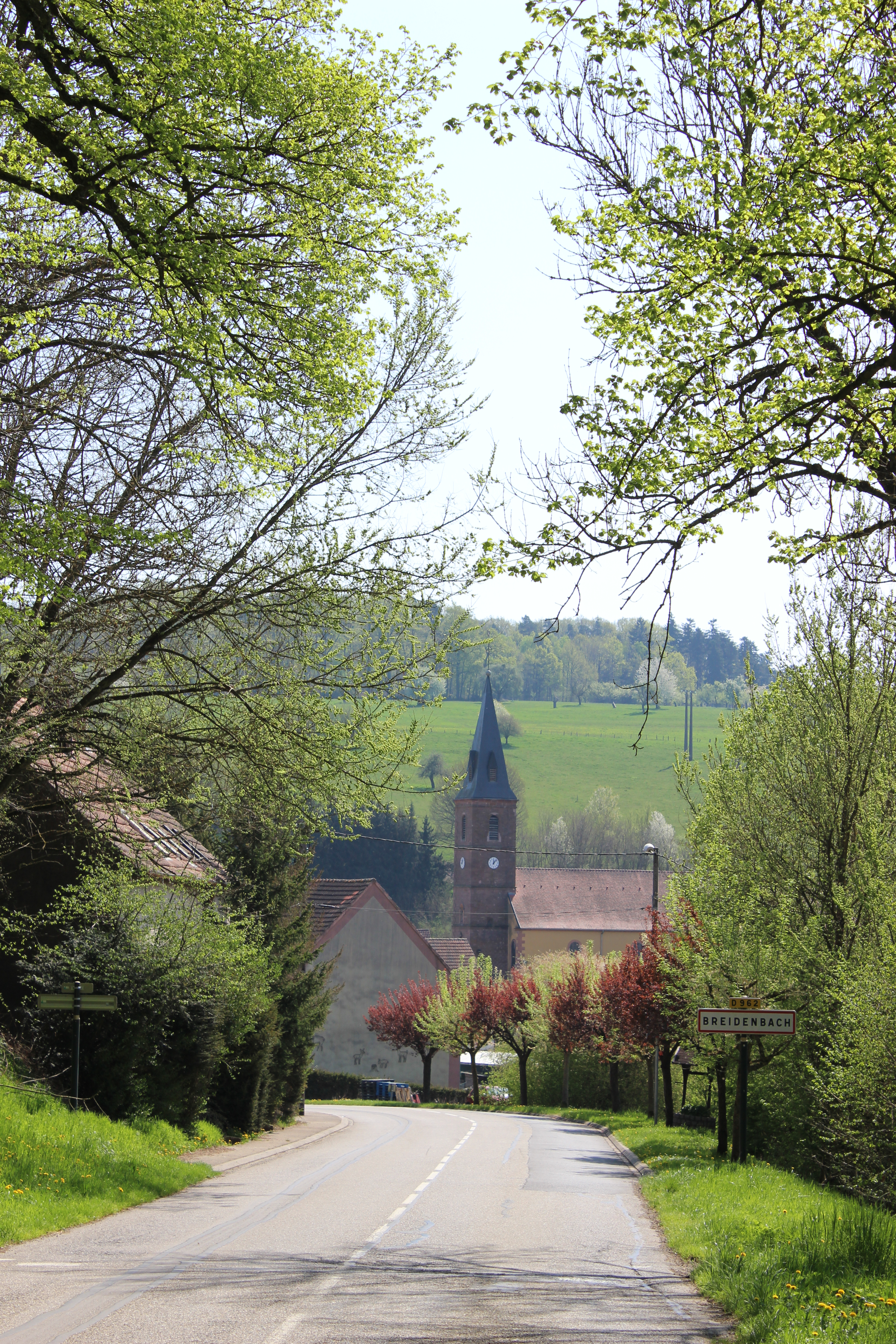 Ortseingang von Breidenbach von der Rue de Bitche aus gesehen